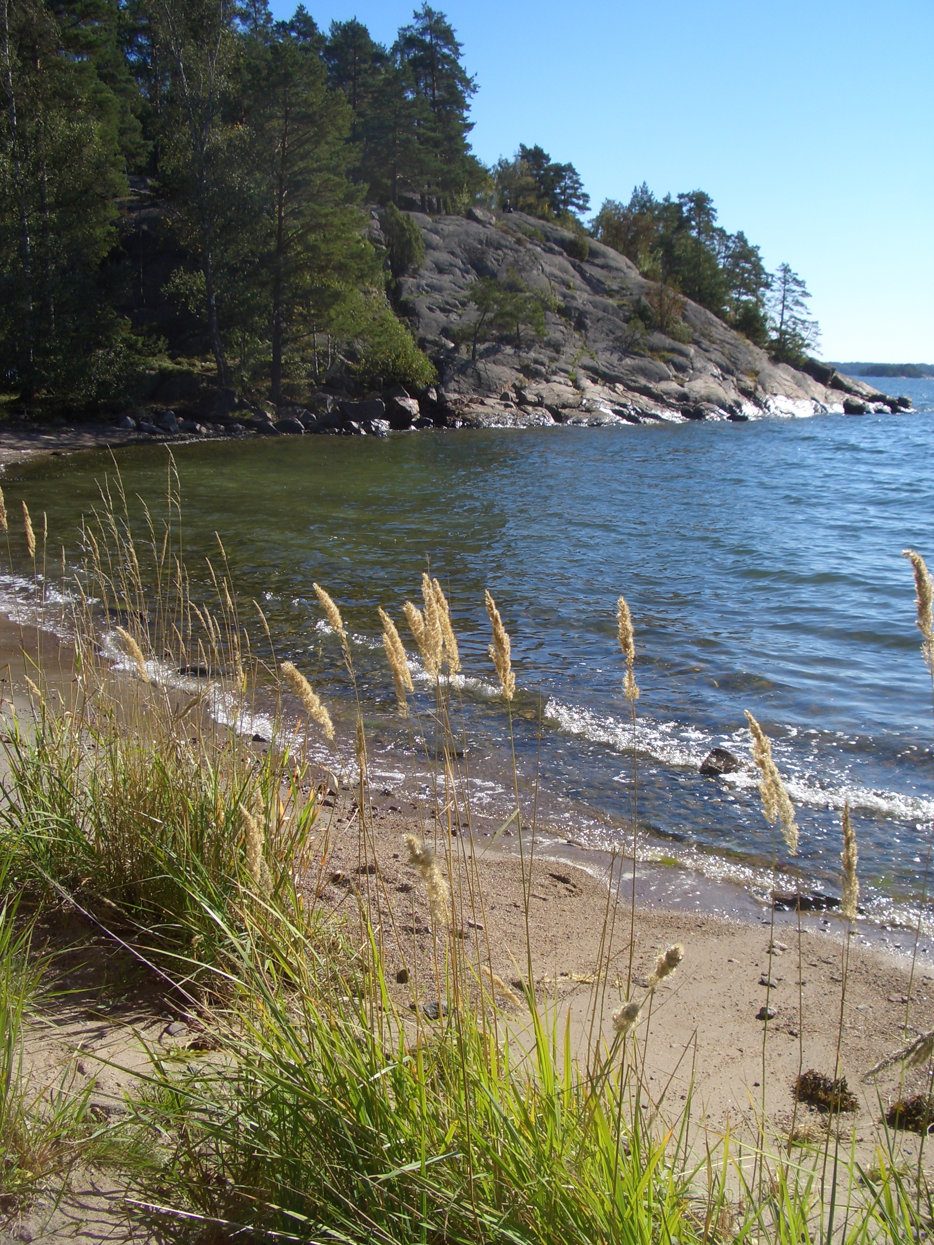 Beach at Södra Grinda, Stockholm archipelago. Photo by Brion Vibber, September 16, 2006.